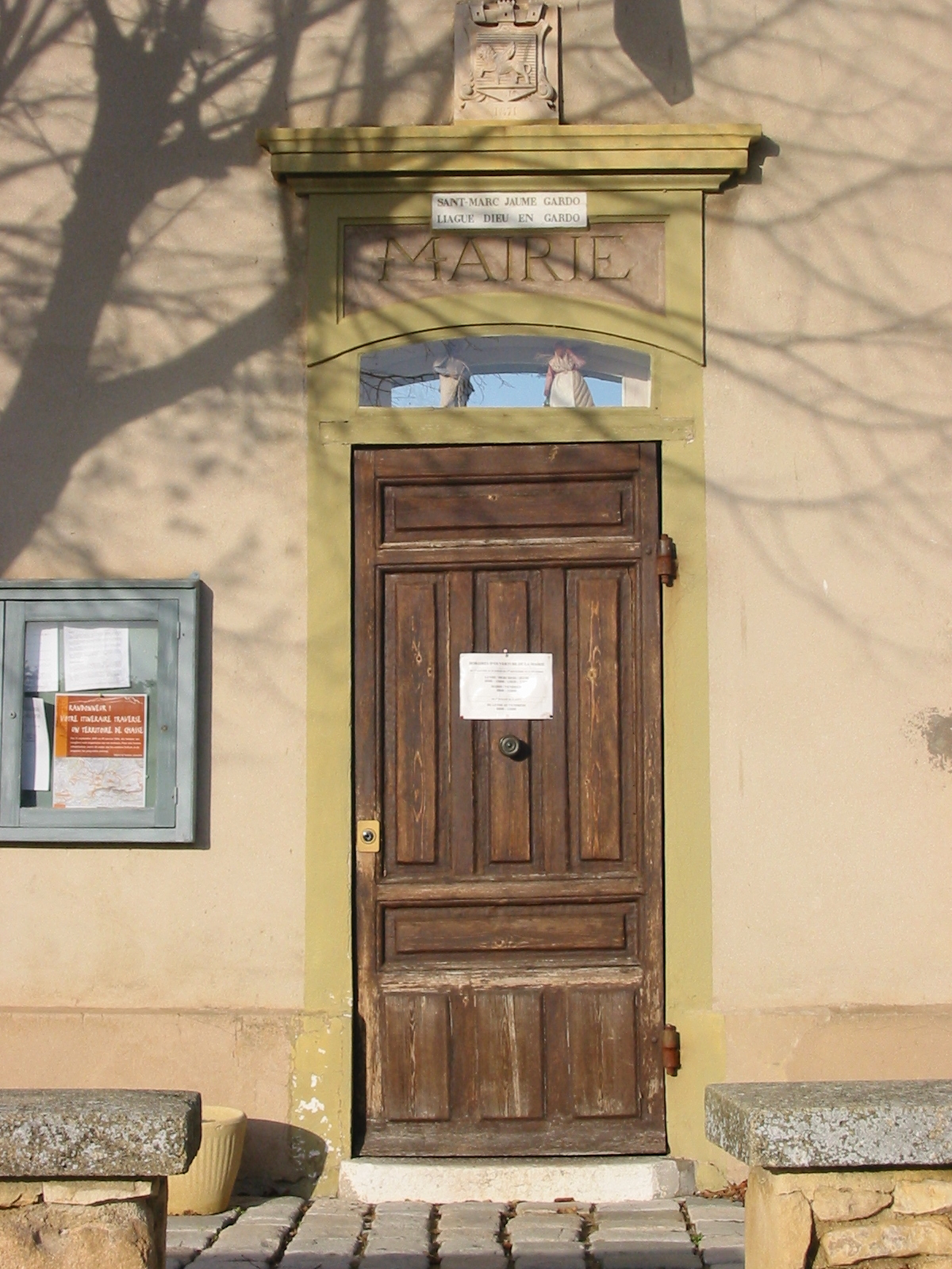 Mairie de Saint-Marc-Jaumegarde (Bouches-du-Rhône)